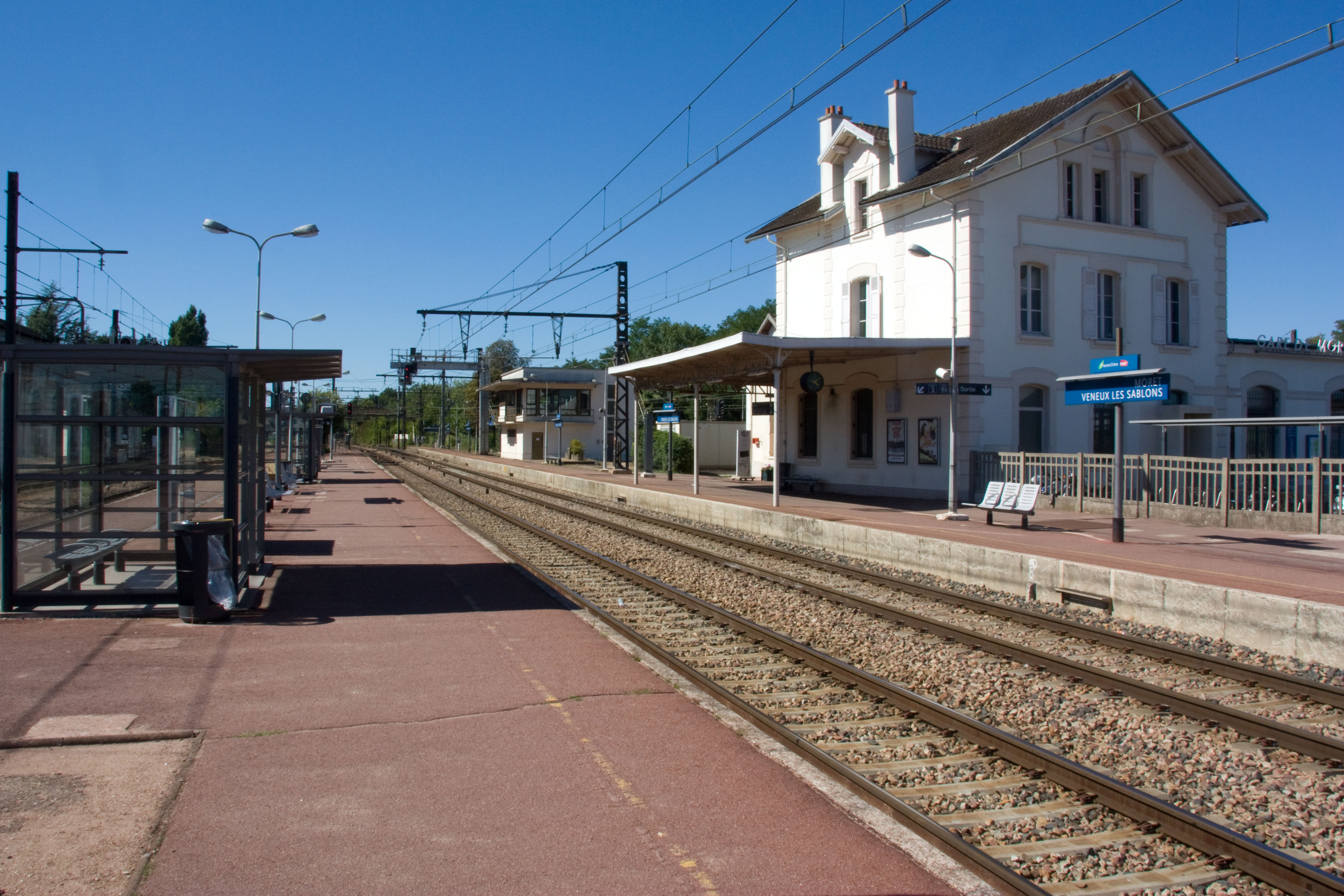 Gare de Moret - Veneux-les-Sablons, Veneux-les-Sablons, Seine-et-Marne, France